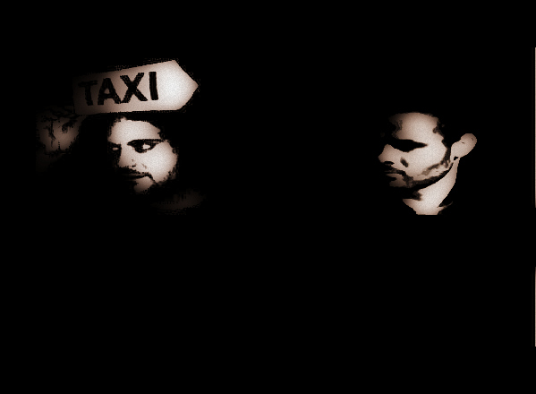 Cajado - Anta do Livramento (2015)